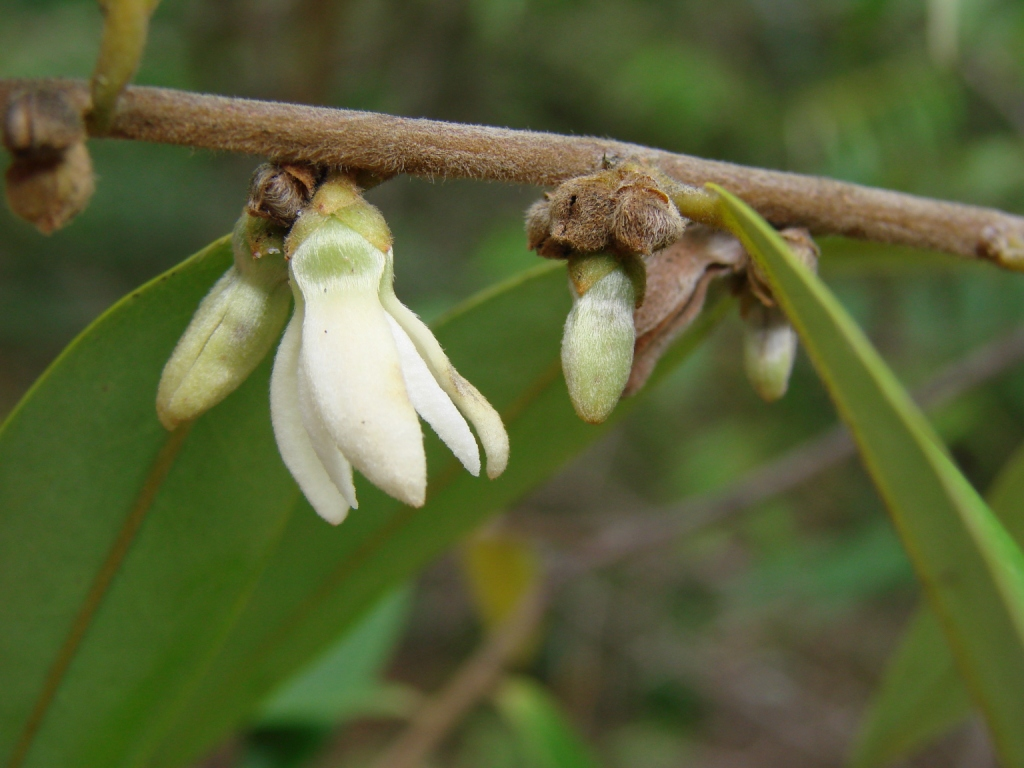 Xylopia sericea - ANNONACEAE Jardim Botânico de Brasília - Distrito Federal - Brasil.